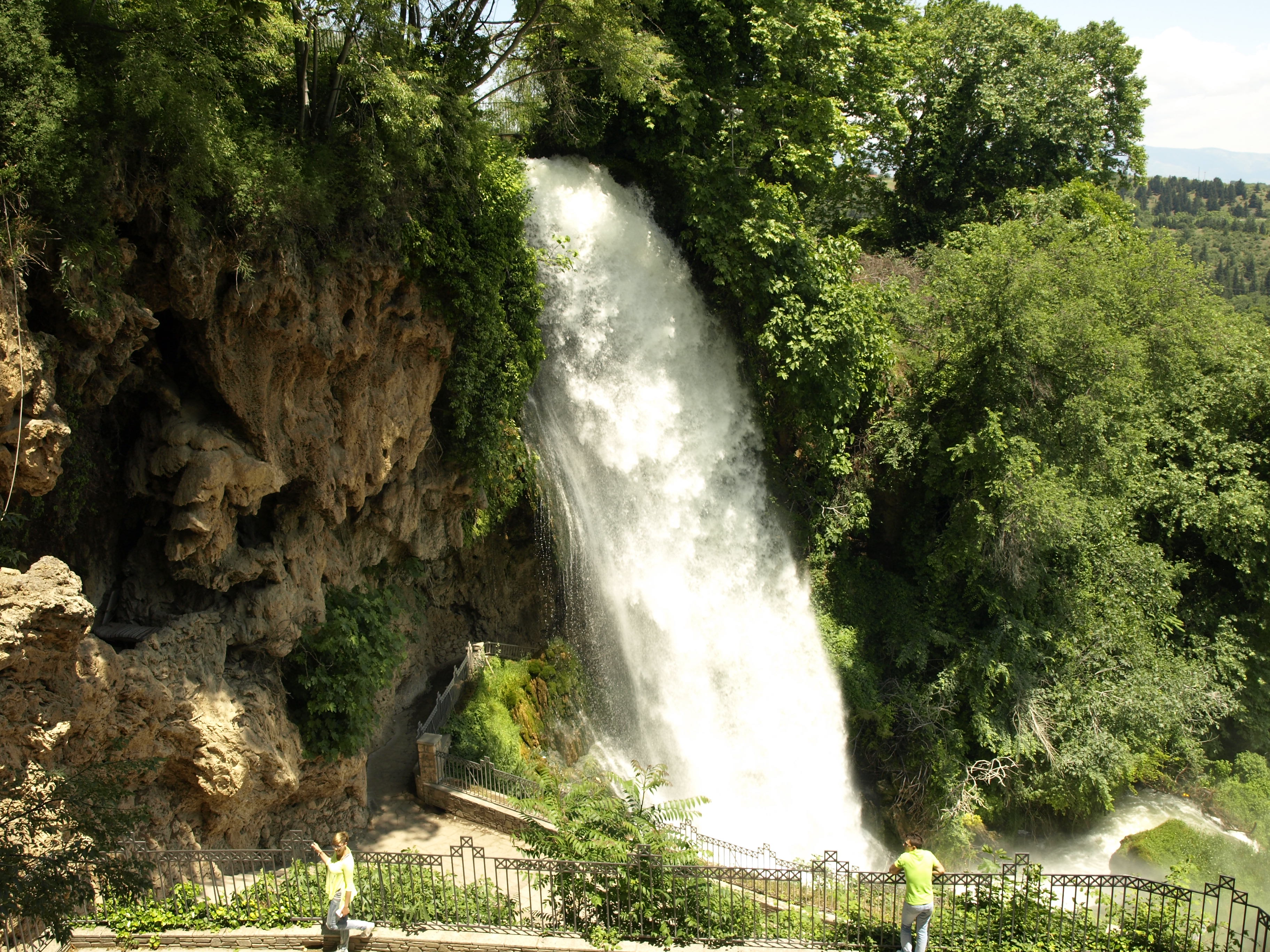 la cascata